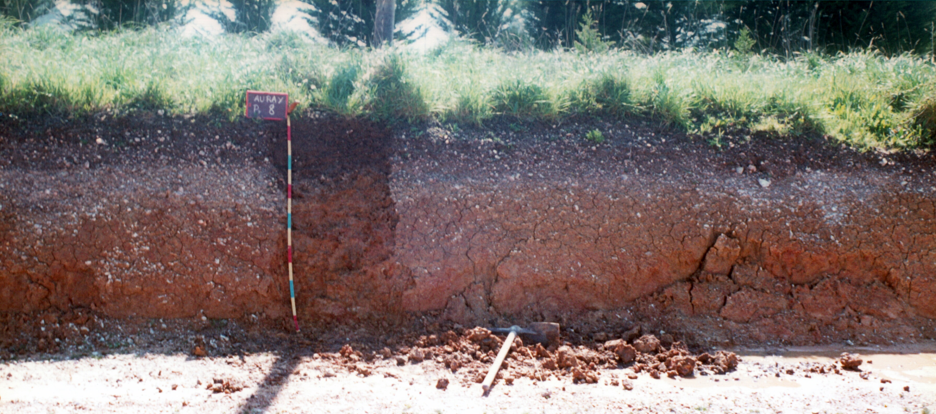 Sol fersiallitique sur Belle-ïle